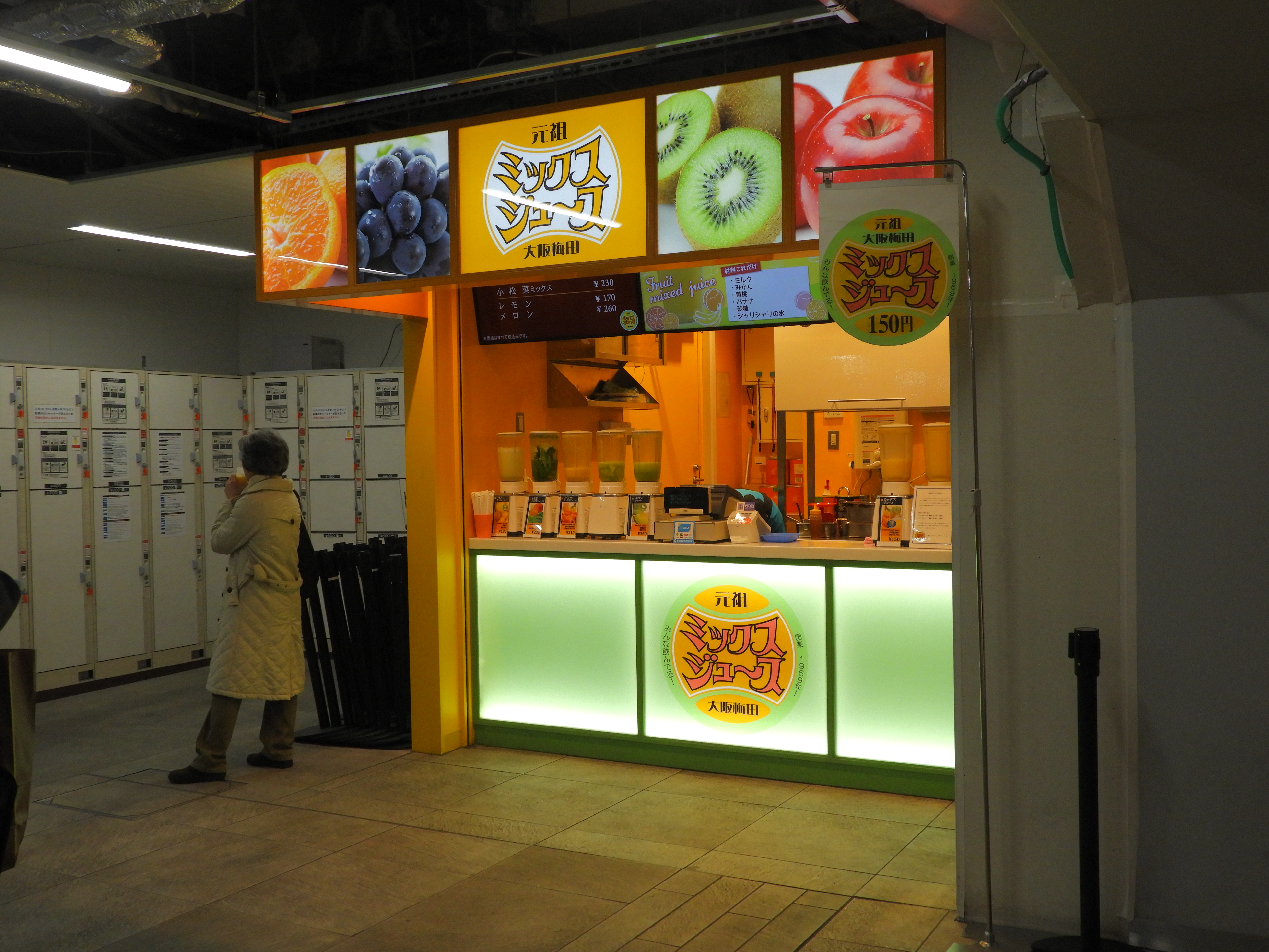 阪神大阪梅田駅付近の「梅田ミックスジュース」 Nikon Coolpix B700